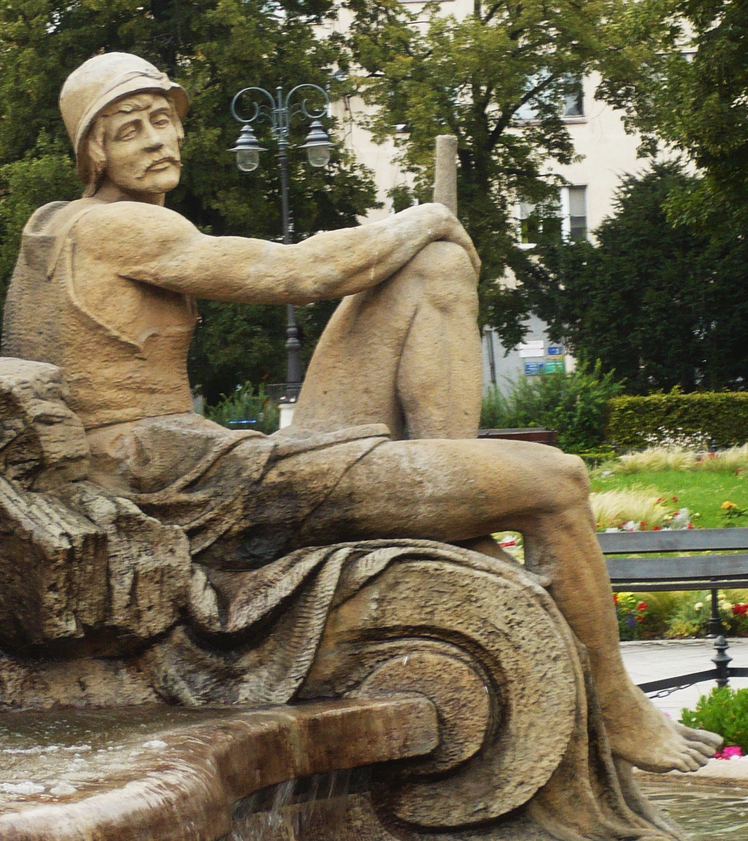 Opole. Fontanna Ceres